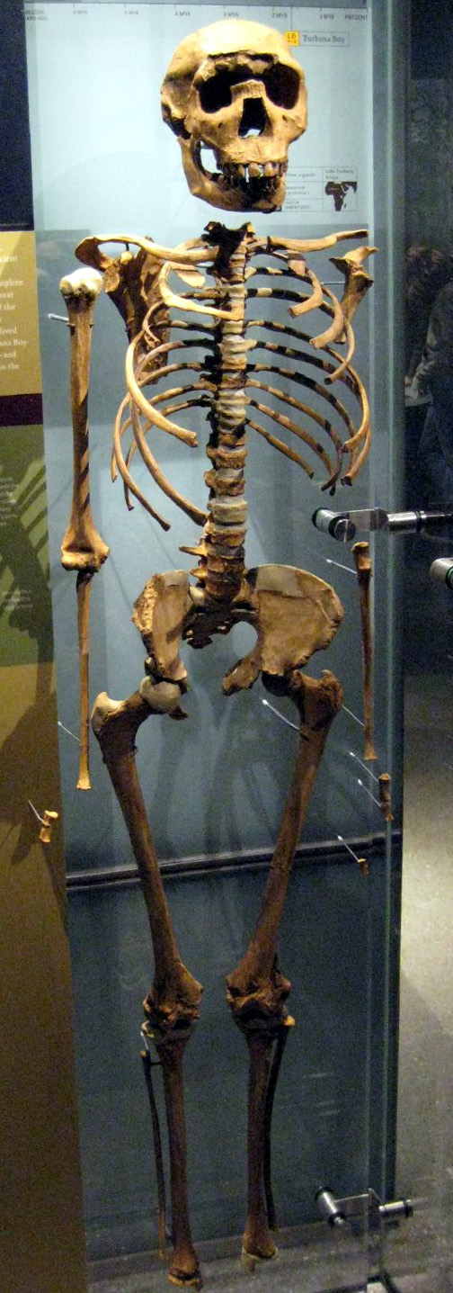 Turkana Boy